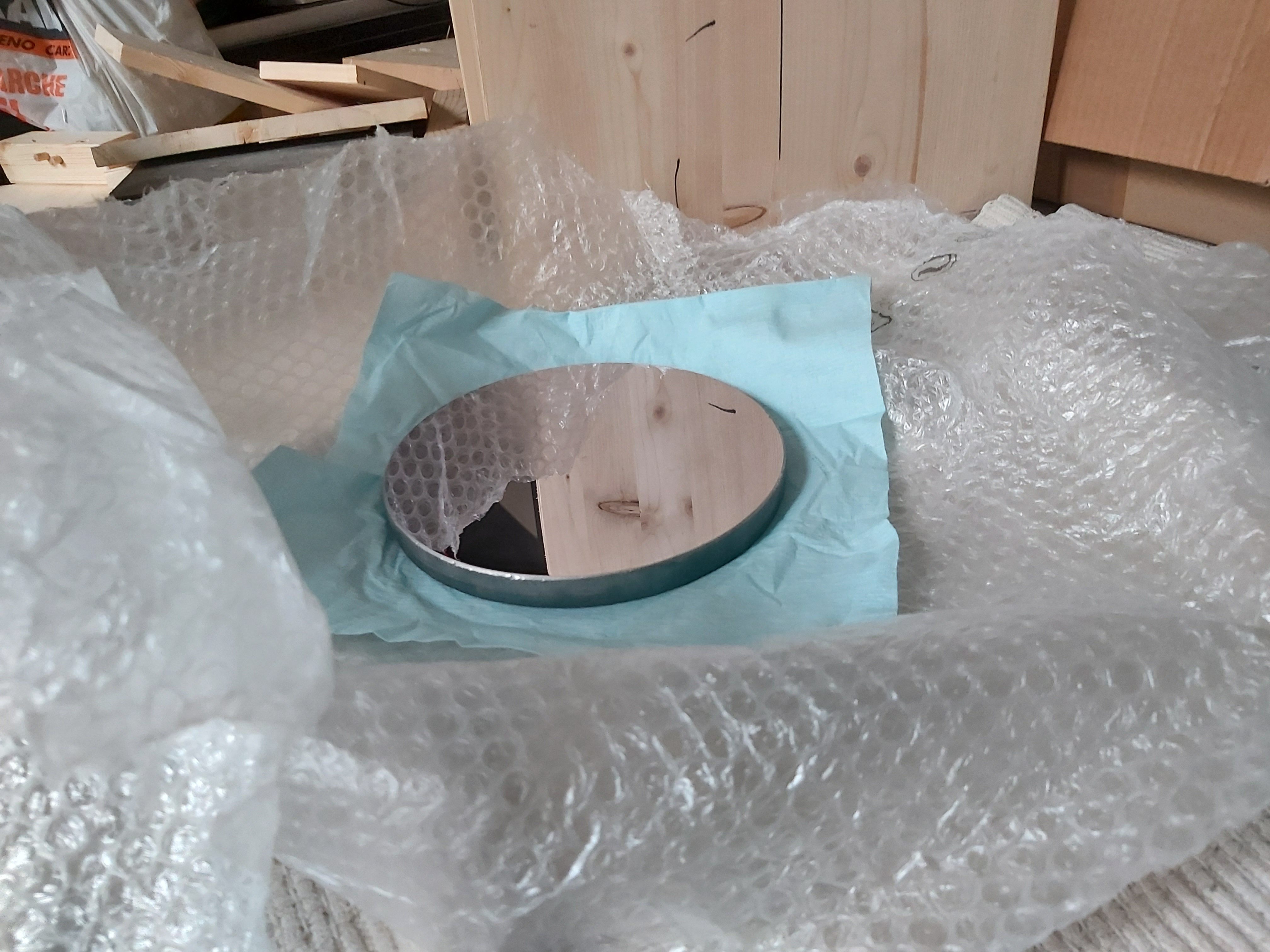 Esempio di specchio parabolico alluminato da 20cm di diametro.